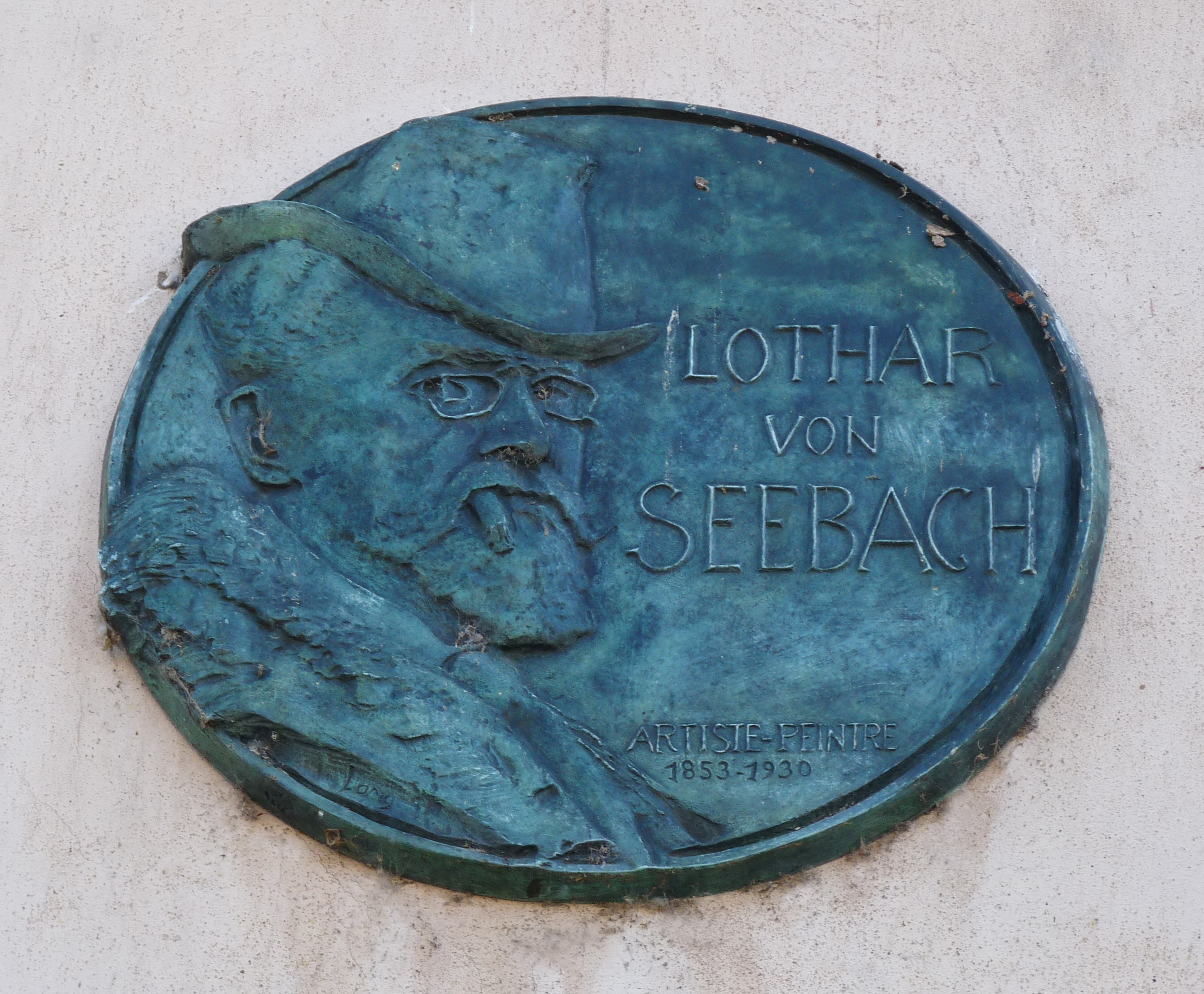 Plaque commémorative (d'après son autoportrait), place de l'Hôpital à Strasbourg du peintre badois Lothar von Seebach (1853-1930) qui passa dans cette ville une grande partie de sa vie.